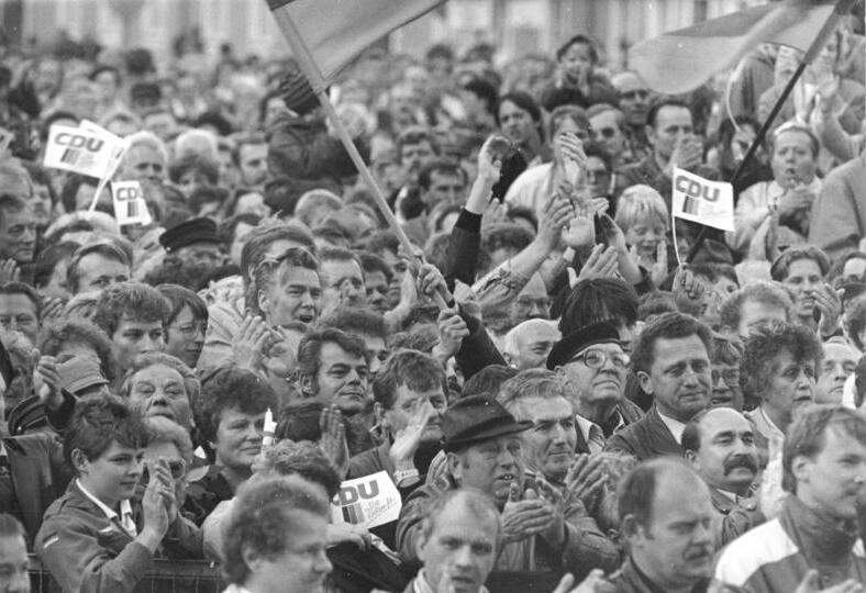 Dessau, CDU-Wahlkundgebung, Publikum ADN-Friedrich Gahlbeck 24 25.9.90 wü Bez. Halle: CDU-Wahlkundgebung in Dessau. Mit scharz-rot-goldenen Fahnen und "Helmut, Helmut"-Rufen empfingen die über 20.000 Teilnehmer Bundeskanzler Helmut Kohl. Information added by Wikimedia users.